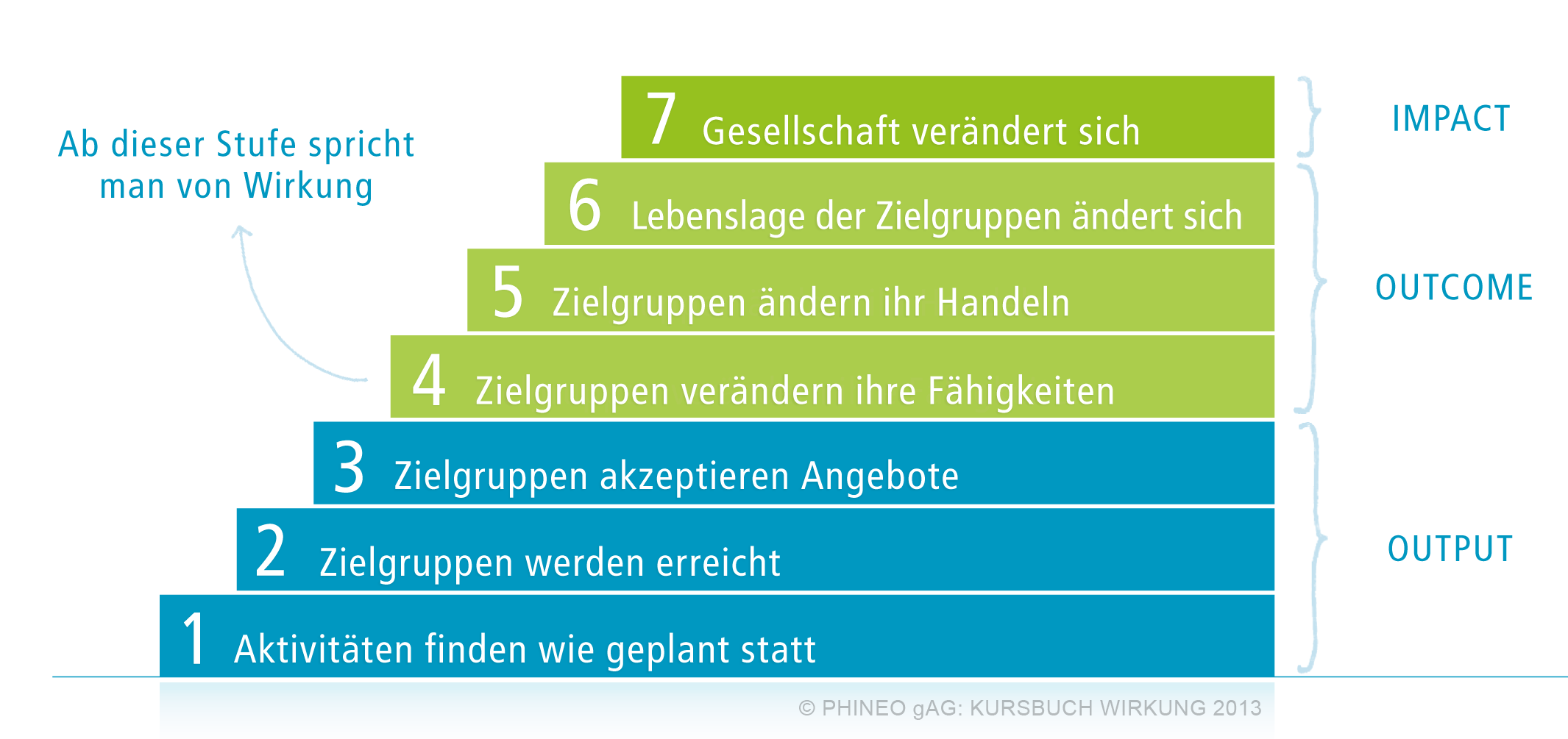 Abgrenzung zwischen Output - Outcome - Impact